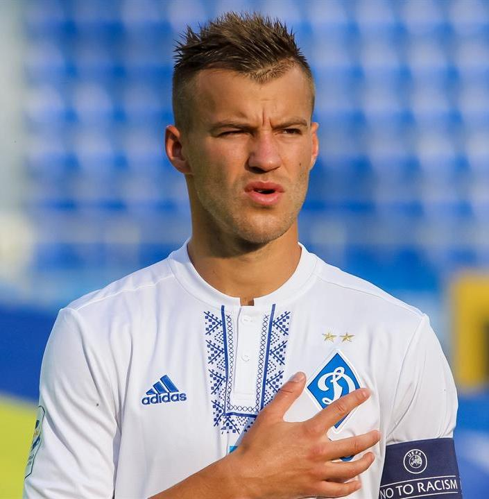 Андрій Ярмоленко - український футболіст